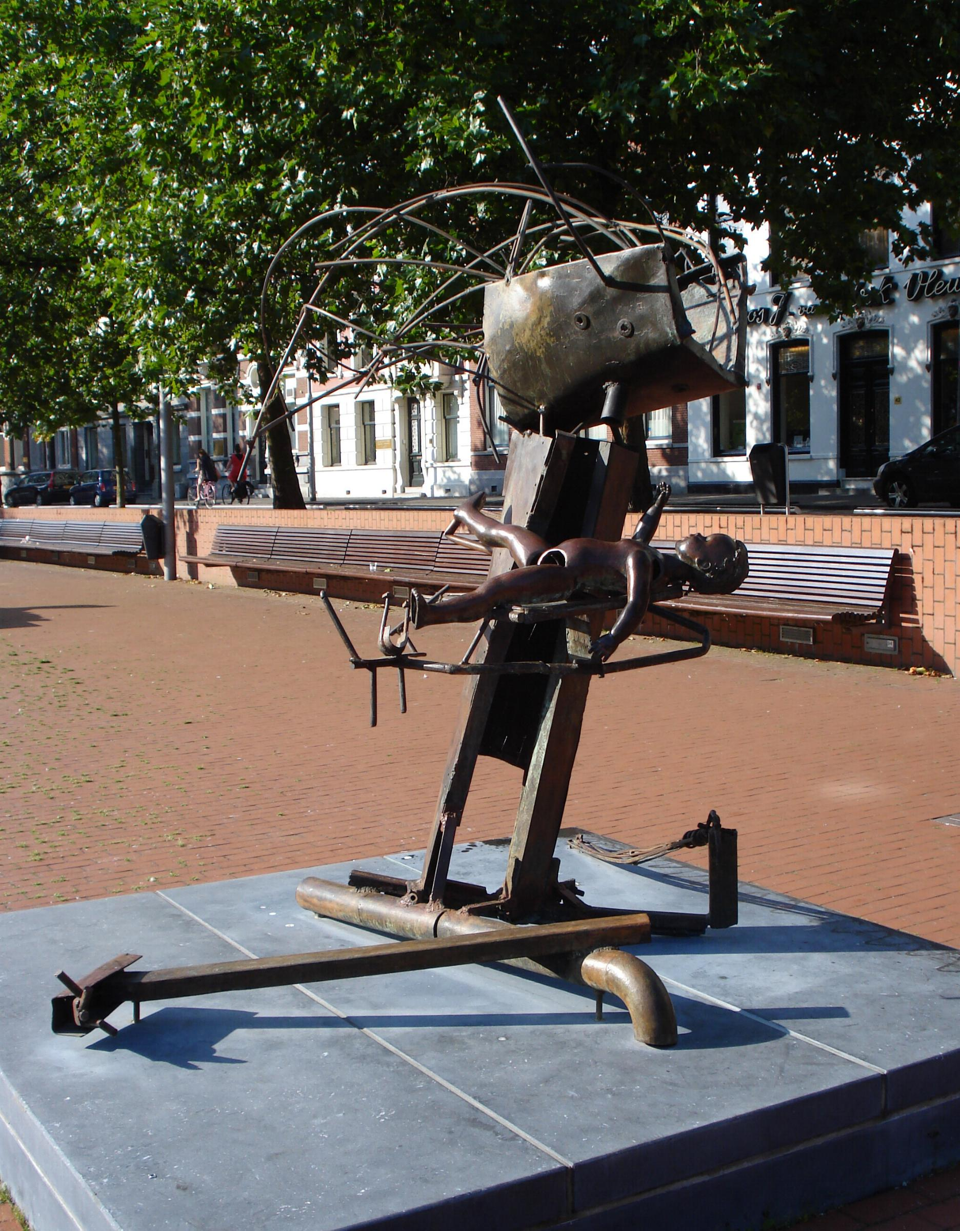 Rotterdam, Westersingel. Kunstwerk "Moeder en kind" van Carel Visser. Rotterdam/The Netherlands.